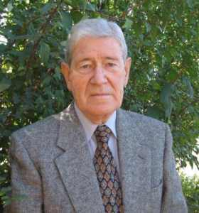 Gastone Marotti